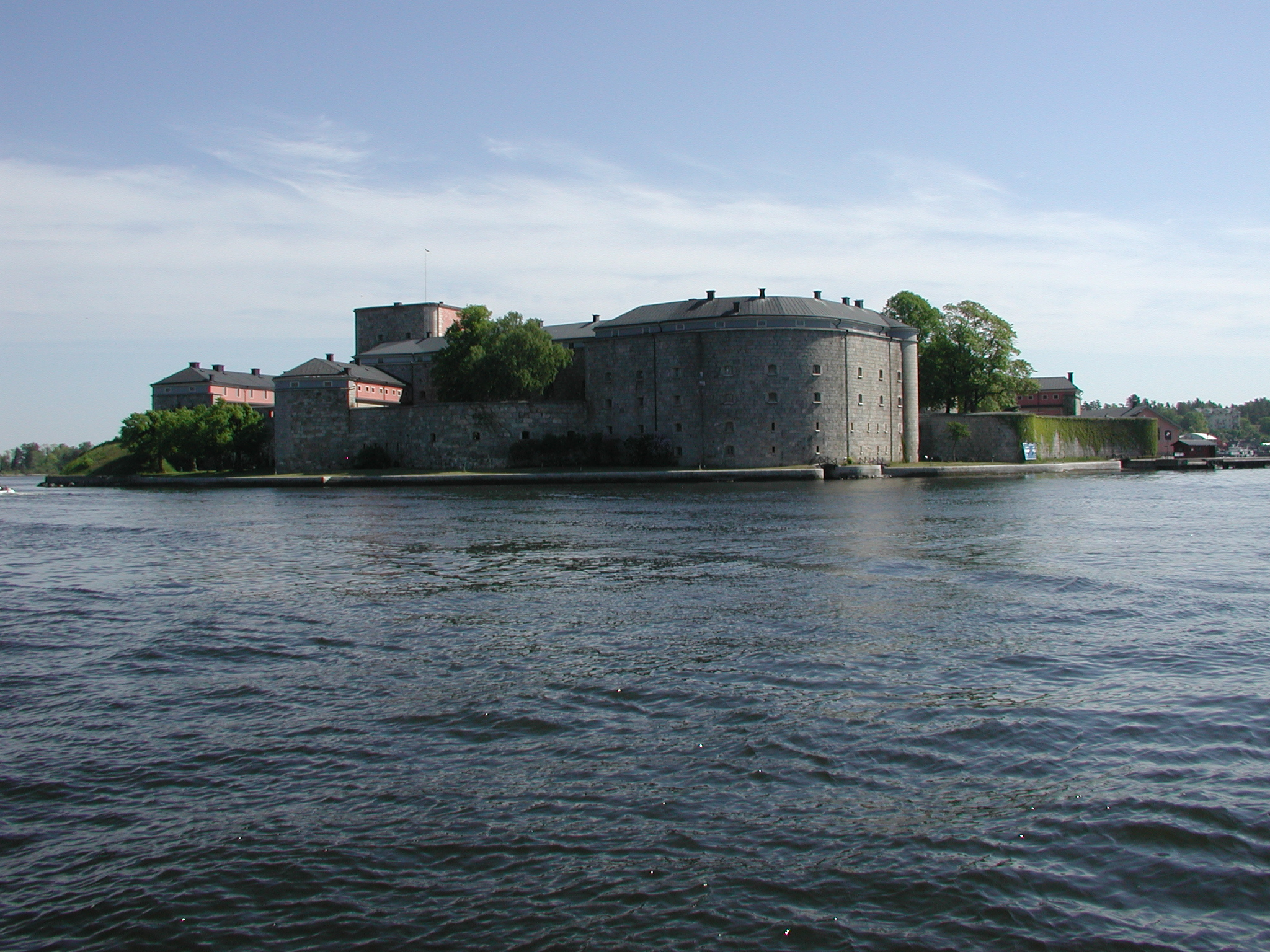 Vaxholms kastell, egen bild